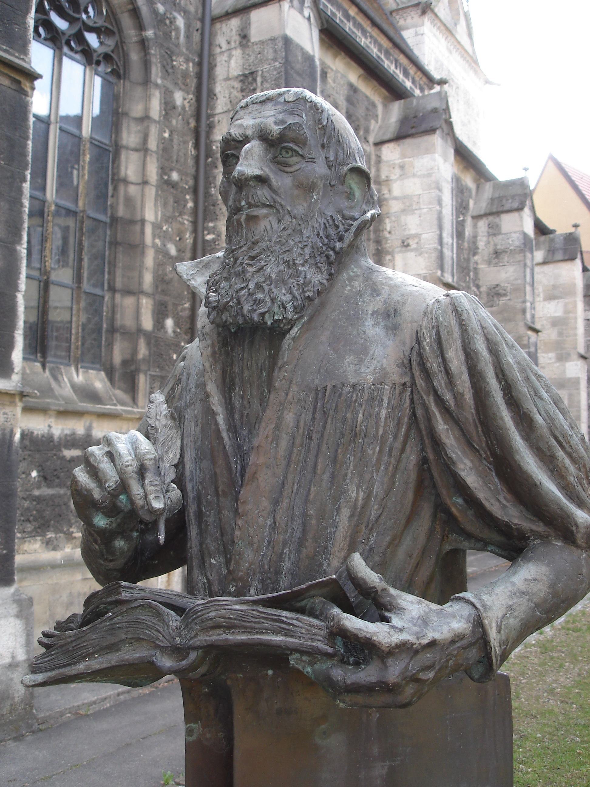 Denkmal für Primus Truber in Bad Urach, im Hintergrund die Amanduskirche